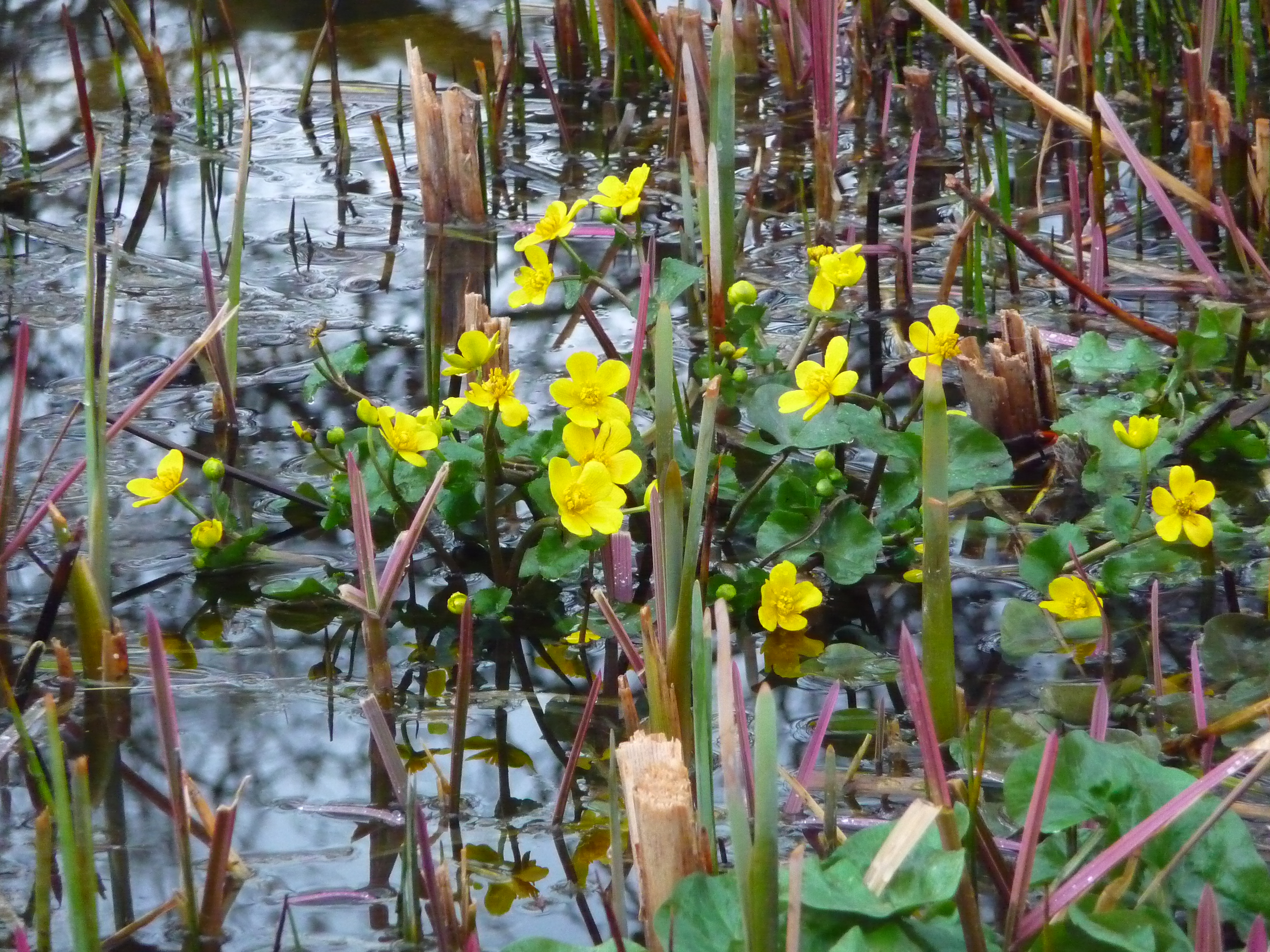 Gelbe Blüten der Sumpfdotterblume (Caltha palustris) spiegeln sich im Wasser eines kleinen Teichs, fotografiert in Heidelberg (Baden-Württemberg, Deutschland)